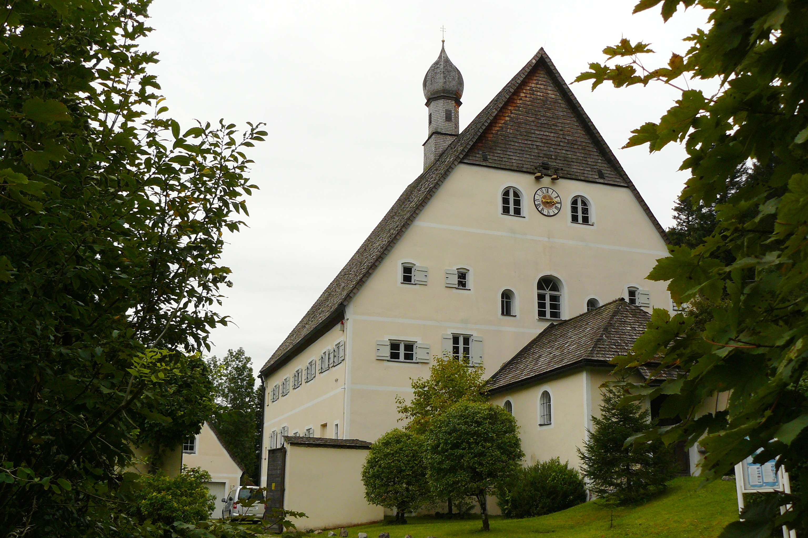 Baudenkmal, Zwergern 1, Klösterl, Kochel am SeeThis is a photograph of an architectural monument.